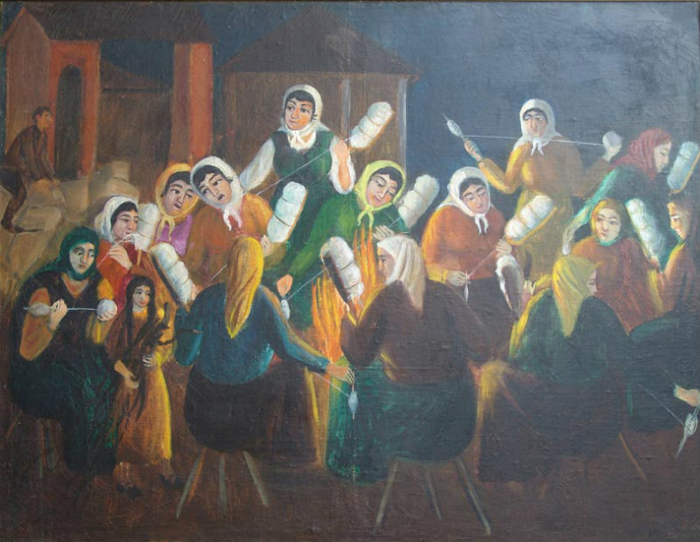 Brašic Janko, Sedeljka,1959.ulje-platno,75x100 cm